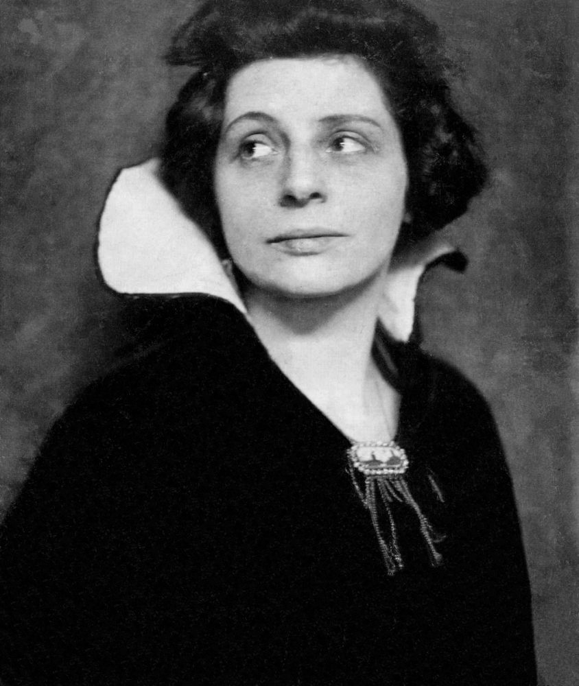 Portrait der Malerin Lou Albert-Lasard. Foto von Hanns Holdt